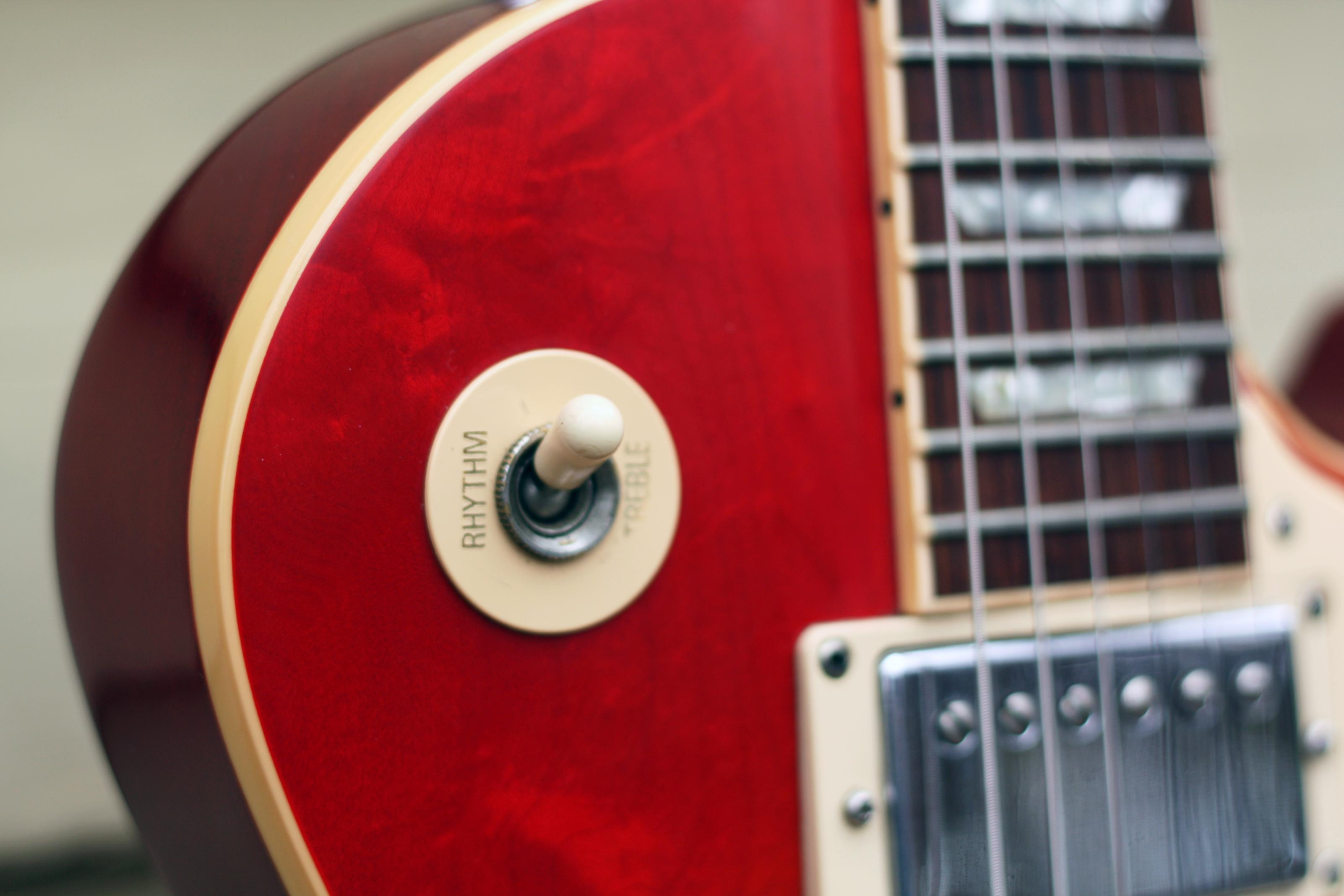 Gibson Les Paul Standard